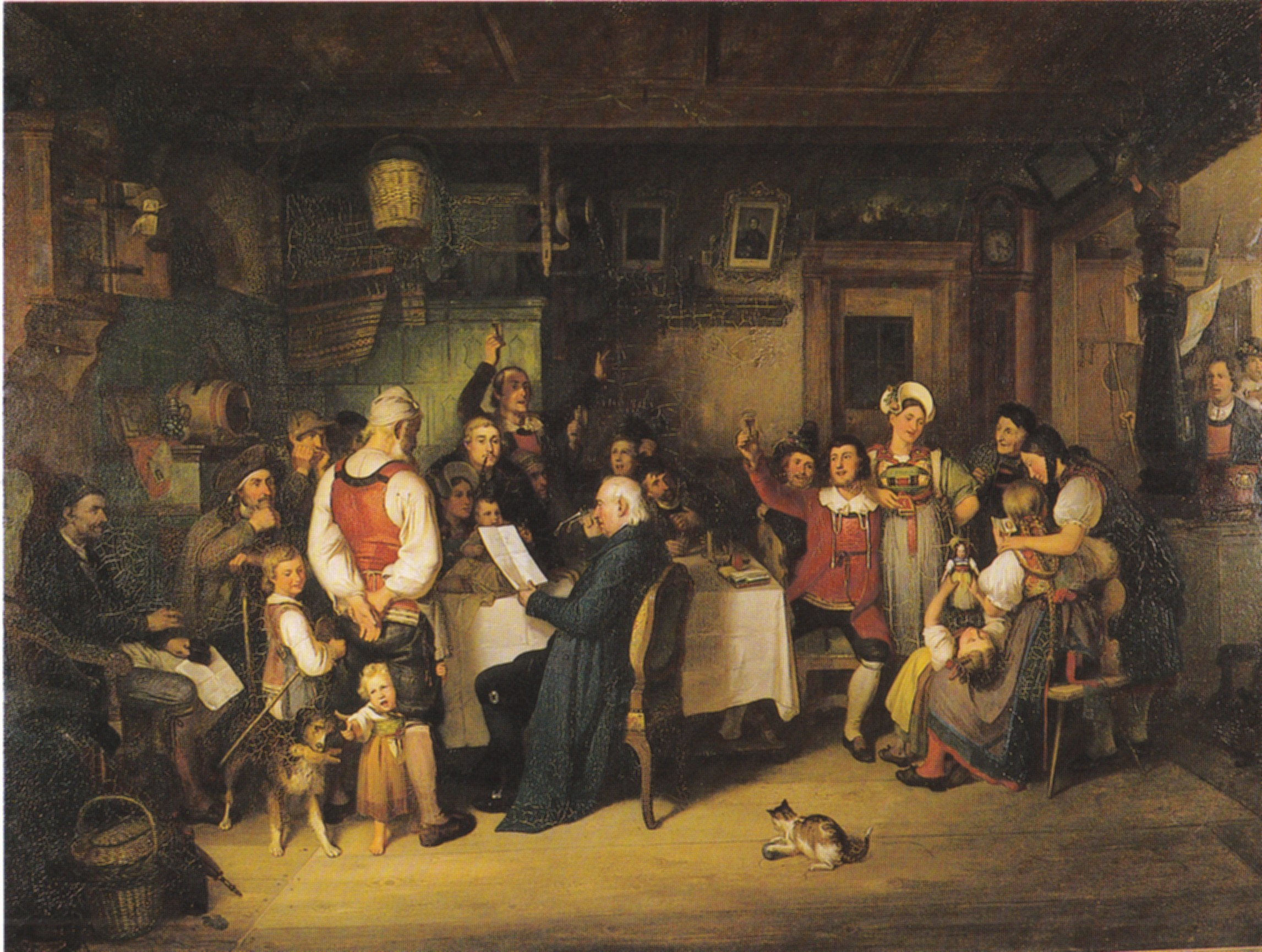 Preisverleihung des landwirtschaftlichen Vereins in einer Hotzenwälder Bauernstube. - Der Schullehrer liest die Urkunde vor; der junge Mann hebt das Glas zum Wohl seiner jungen Frau, die eine Medaille für den schönsten Strohhut erhalten soll.